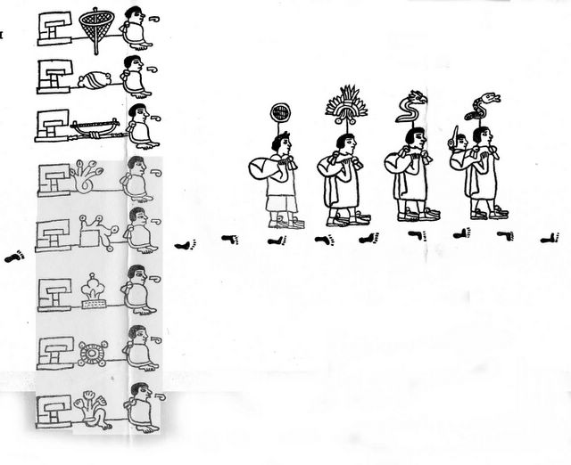 Sección del Código Boturini donde se encuentra el glifo correspondiente a la tribu tepaneca como uno de los pueblos que peregrinaron hacia la Cuenca de México.